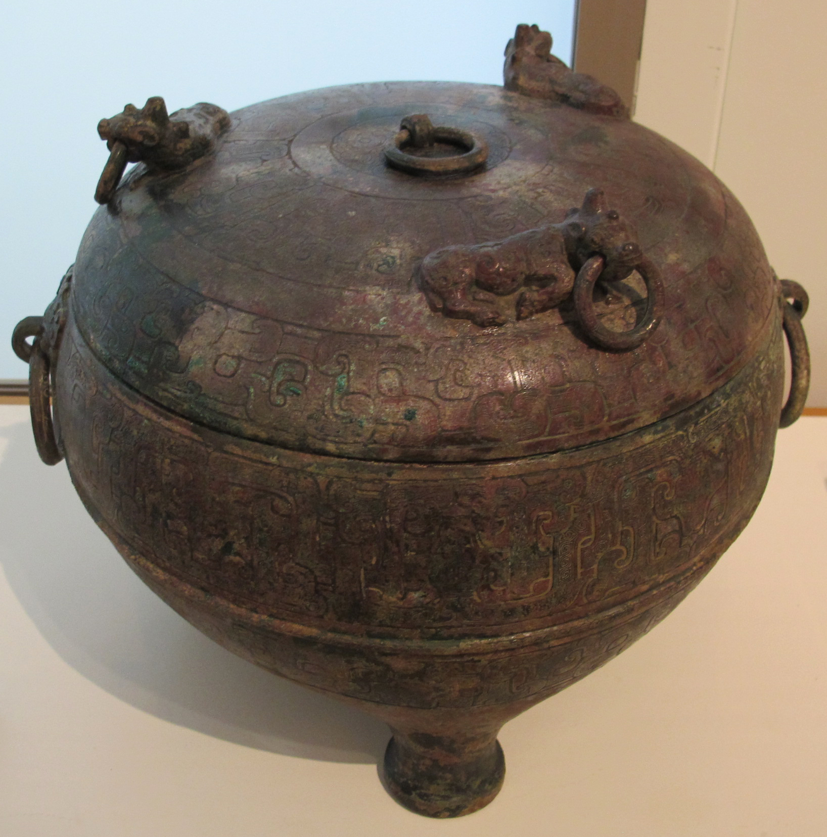 Fine dell'epoca delle primavere e autunni, vaso ding, da liyu, VI-V sec ac.